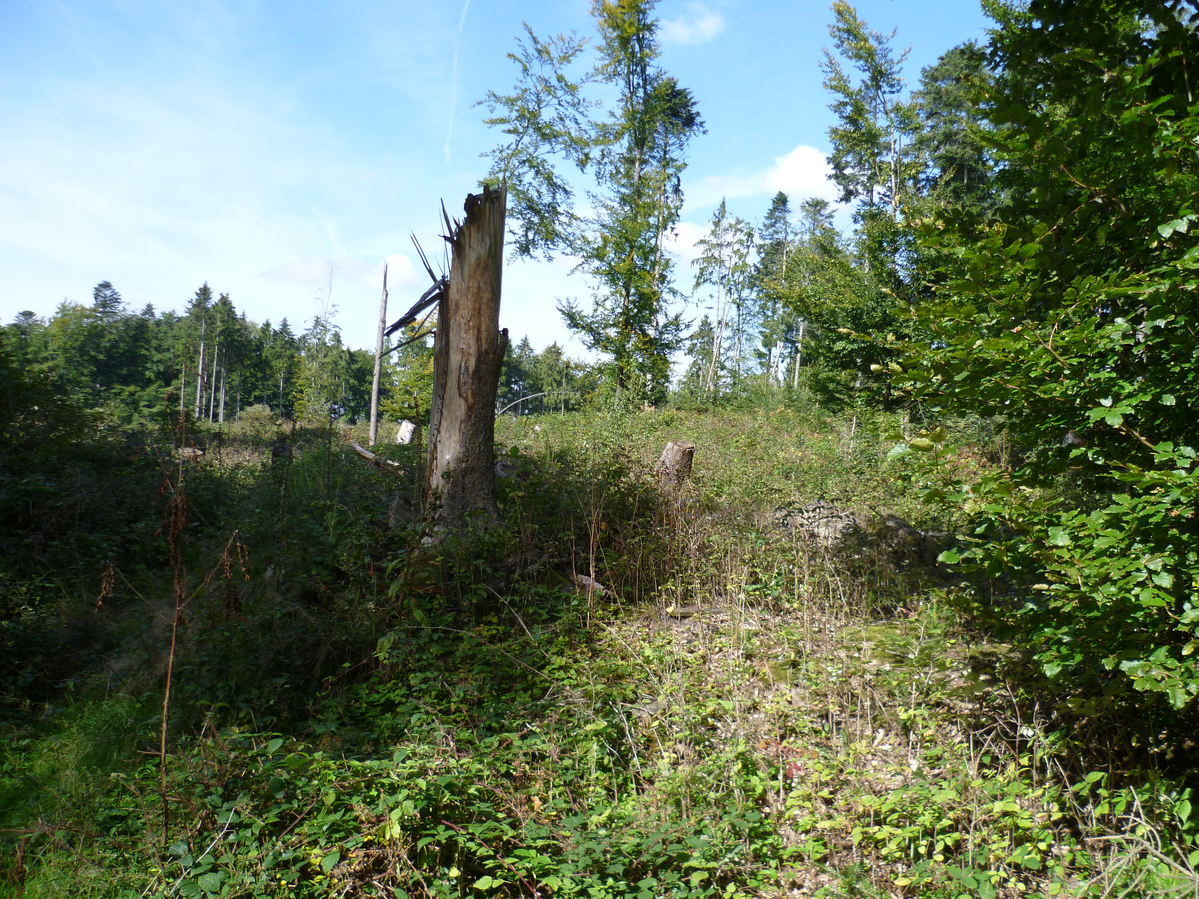 Fundstelle der Wachtürme 3/10 am Limes in der Nähe des Hofgut Georgenthal